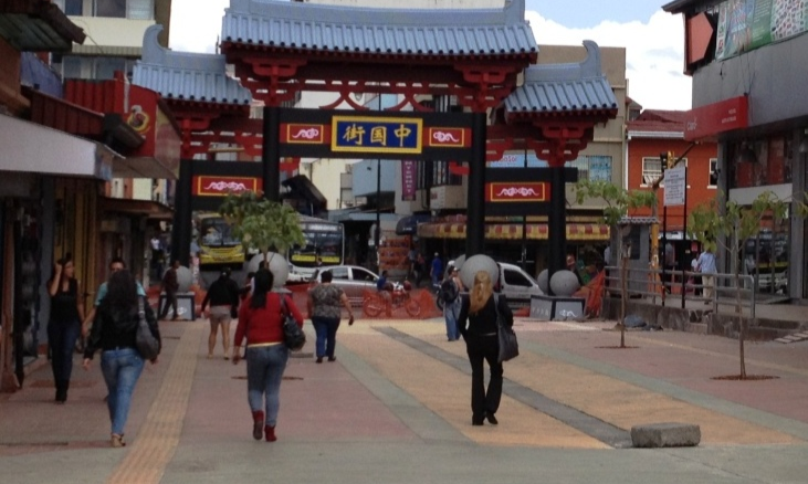 Puerta representativa del la Dinastía Tang con 8 esferas de granito en representación de las esferas de piedra como símbolo de Costa Rica, donadas por la República Popular China, como amistad de ambos pueblos y para ser la puerta de entrada al nuevo Barrio Chino en San José, Costa Rica.